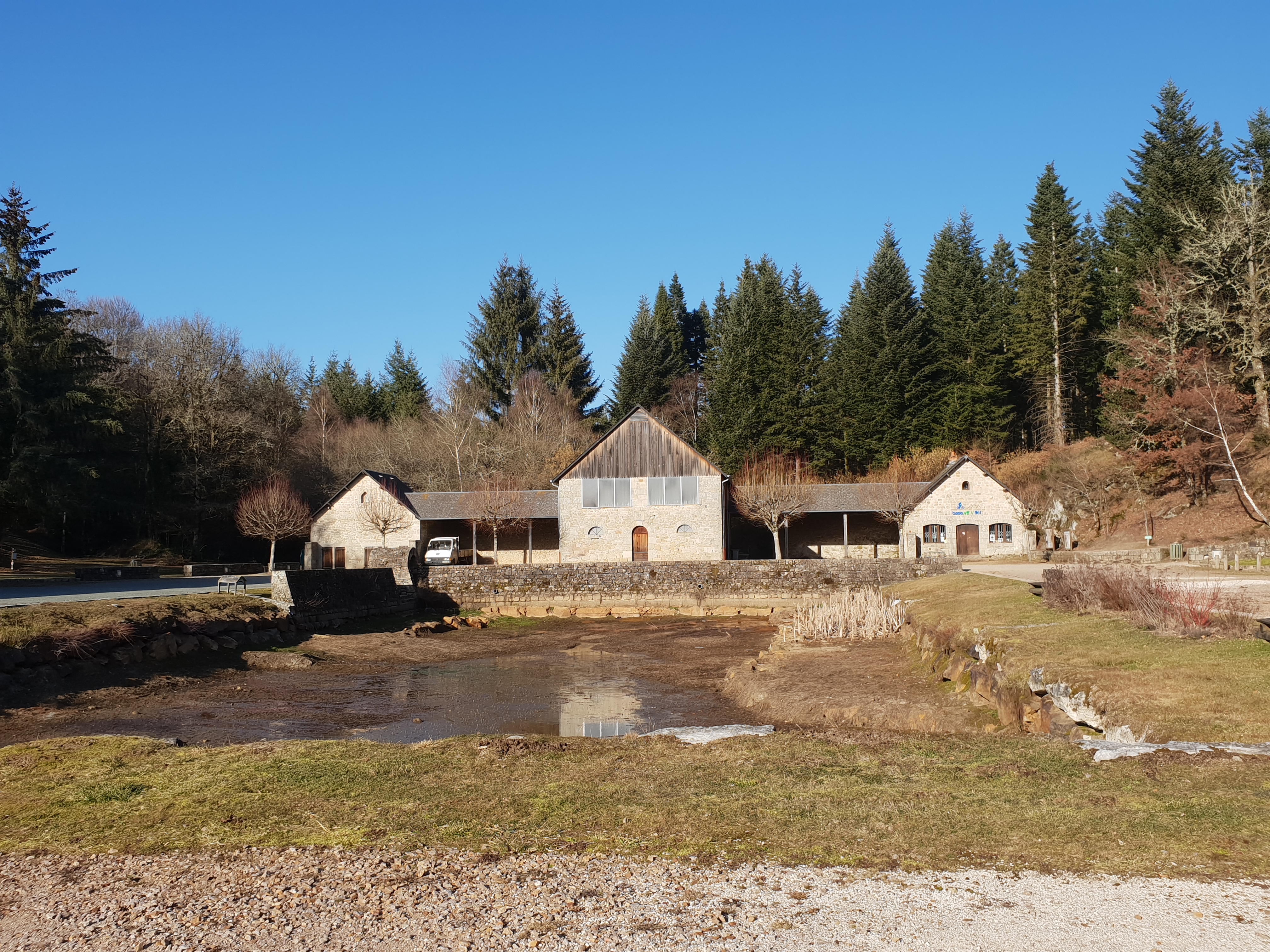 Photo montrant le grenier corrézien situé derrière le château dans le domaine de Sédières